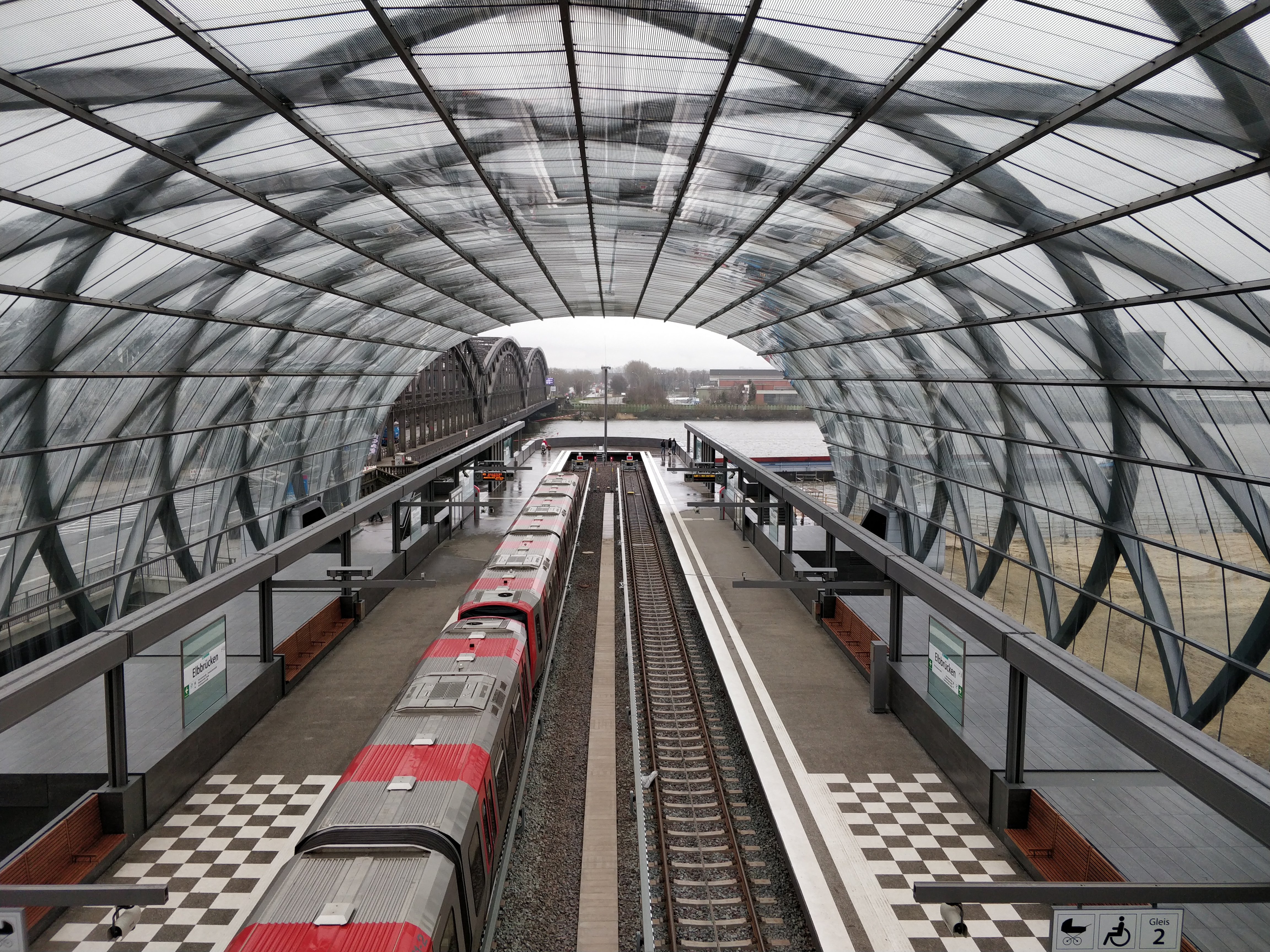 Der Blick vom Skywalk auf die Gleise des U-Bahnhofes Elbbrücken (U4).